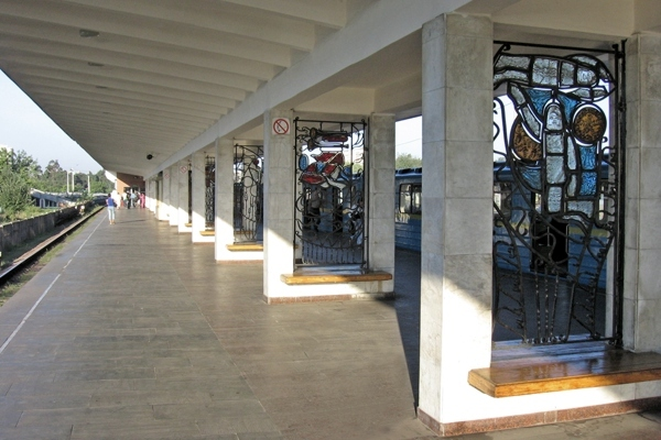 Cтанция метро «Лесная», пассажирская платформа